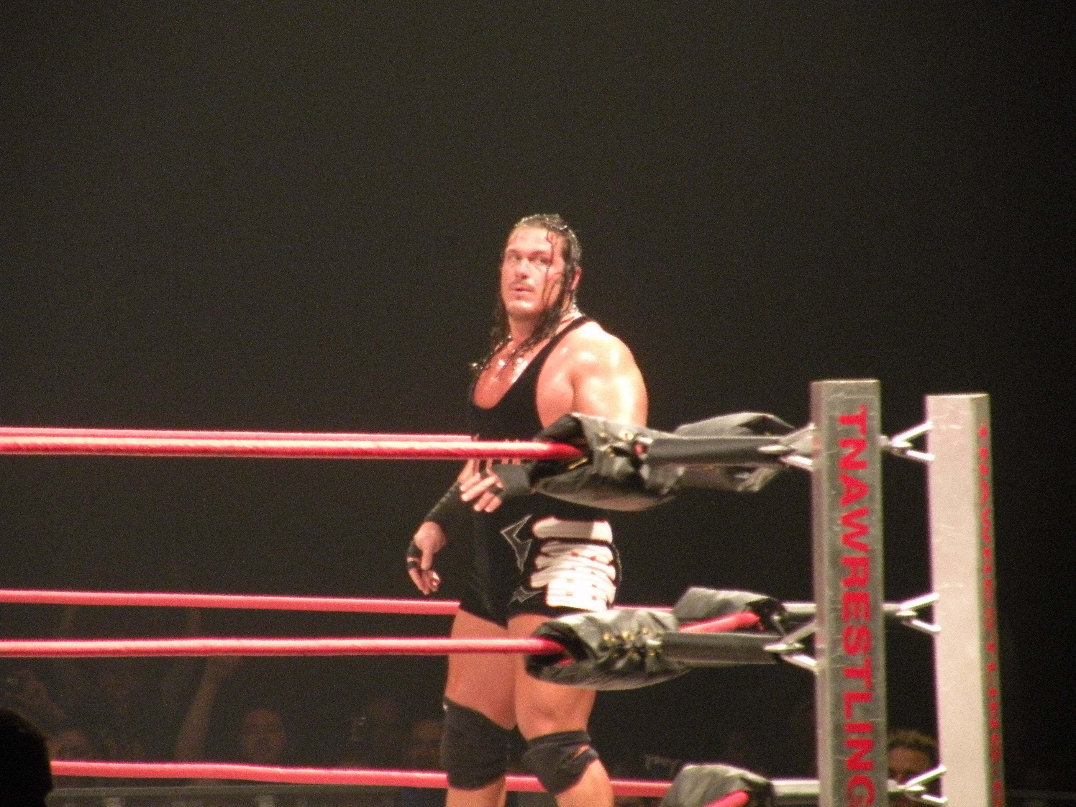 Terry Gerin tna paris zenith